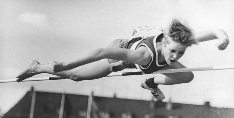 Rita Schmidt Zentralbild Schaar 30.4.1968 Leipzig: Rita Schmidt weltbeste Hochspringerin. Die 17jährige Hochspringerin Rita Schmidt (SC Wissenschaft DHfK Leipzig) in rasanter Aktion. Ihre großartige Form bei den letzten Hallenwettkämpfen (mit 1,85 m Weltjahresbestleistung) will sie auch in der Freiluftsaison erreichen. Höhepunkt ihrer noch jungen sportlichen Laufbahn wird die Teilnahme an den Olympischen Sommerspielen in Mexiko-Stadt sein. (siehe auch G0430-01-1N, G0430-02-1N und G0430-03-1N)